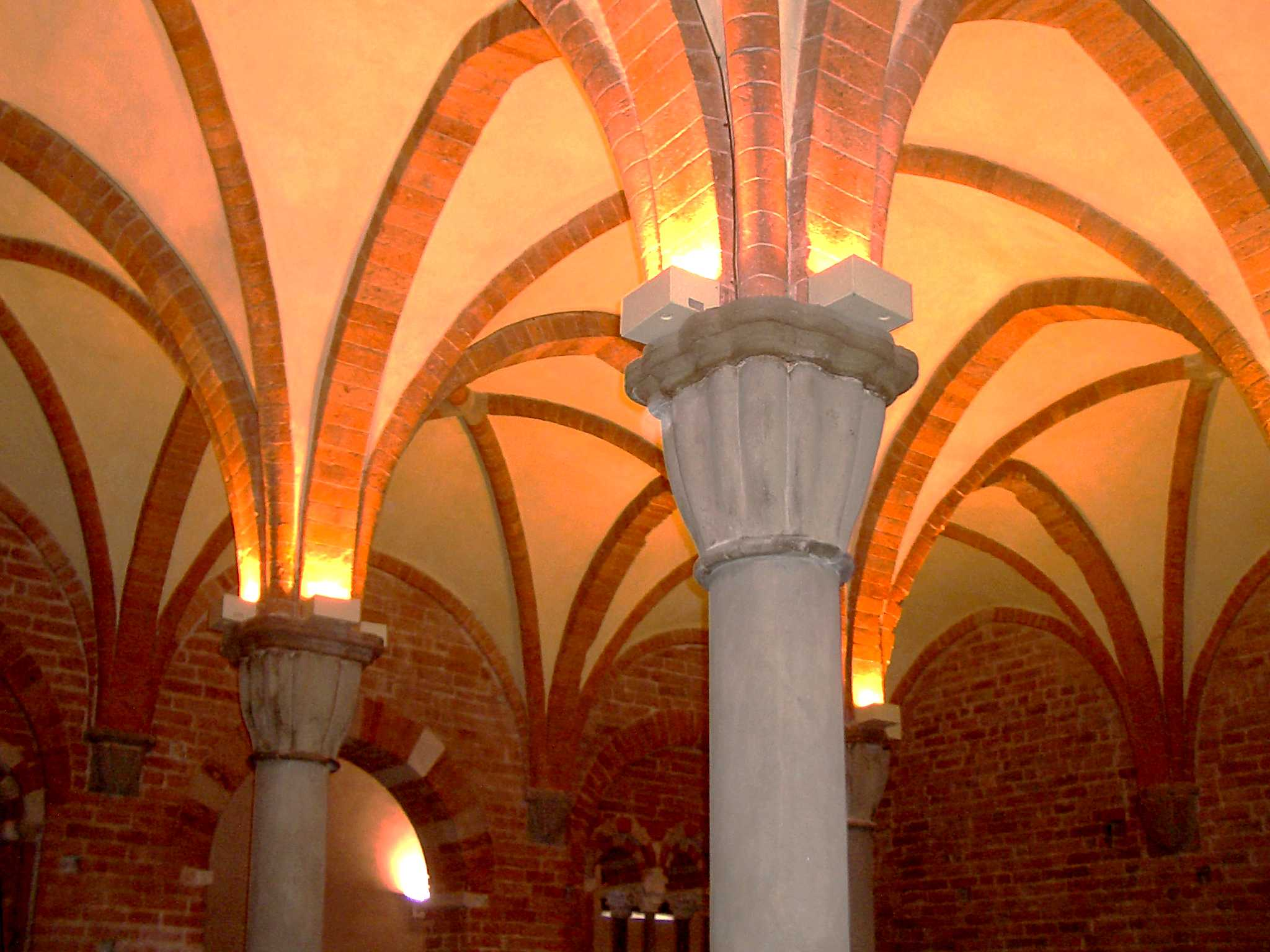 Rivalta Scrivia, Saint Mary’s Abbey”, “aula capitolare”